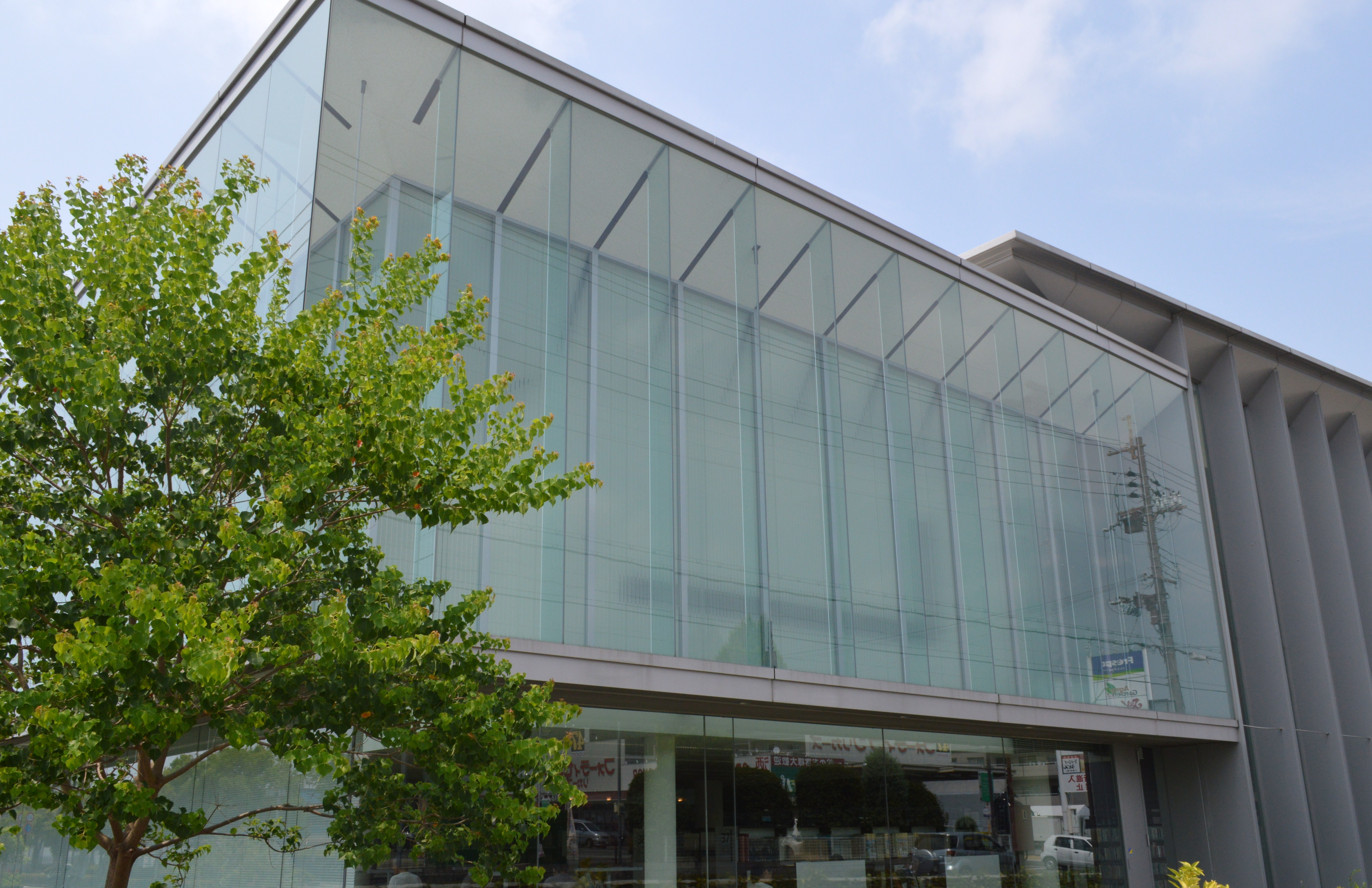 赤穂市立図書館。